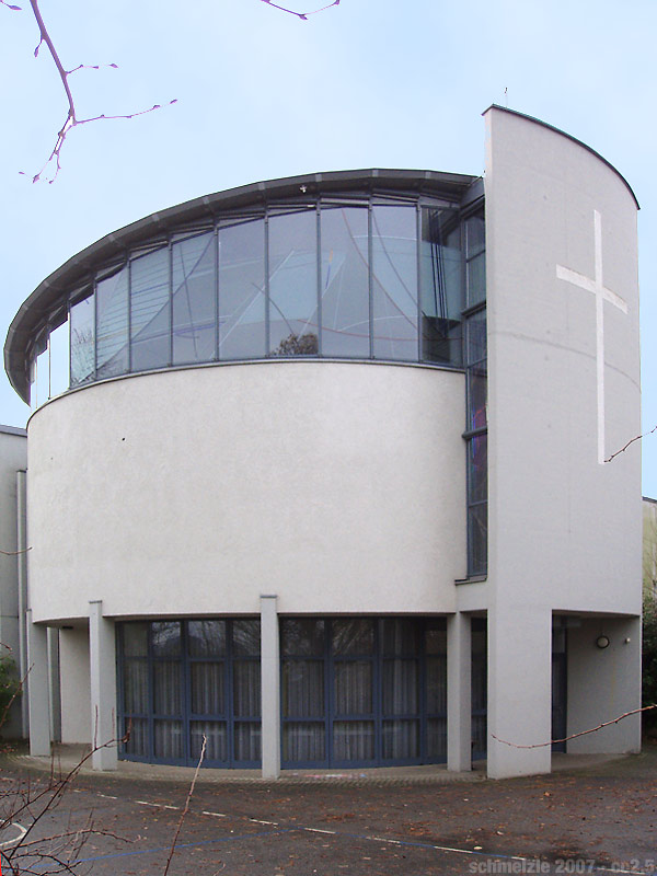 Versöhnungskirche im Kreuzgrund in Heilbronn-Böckingen